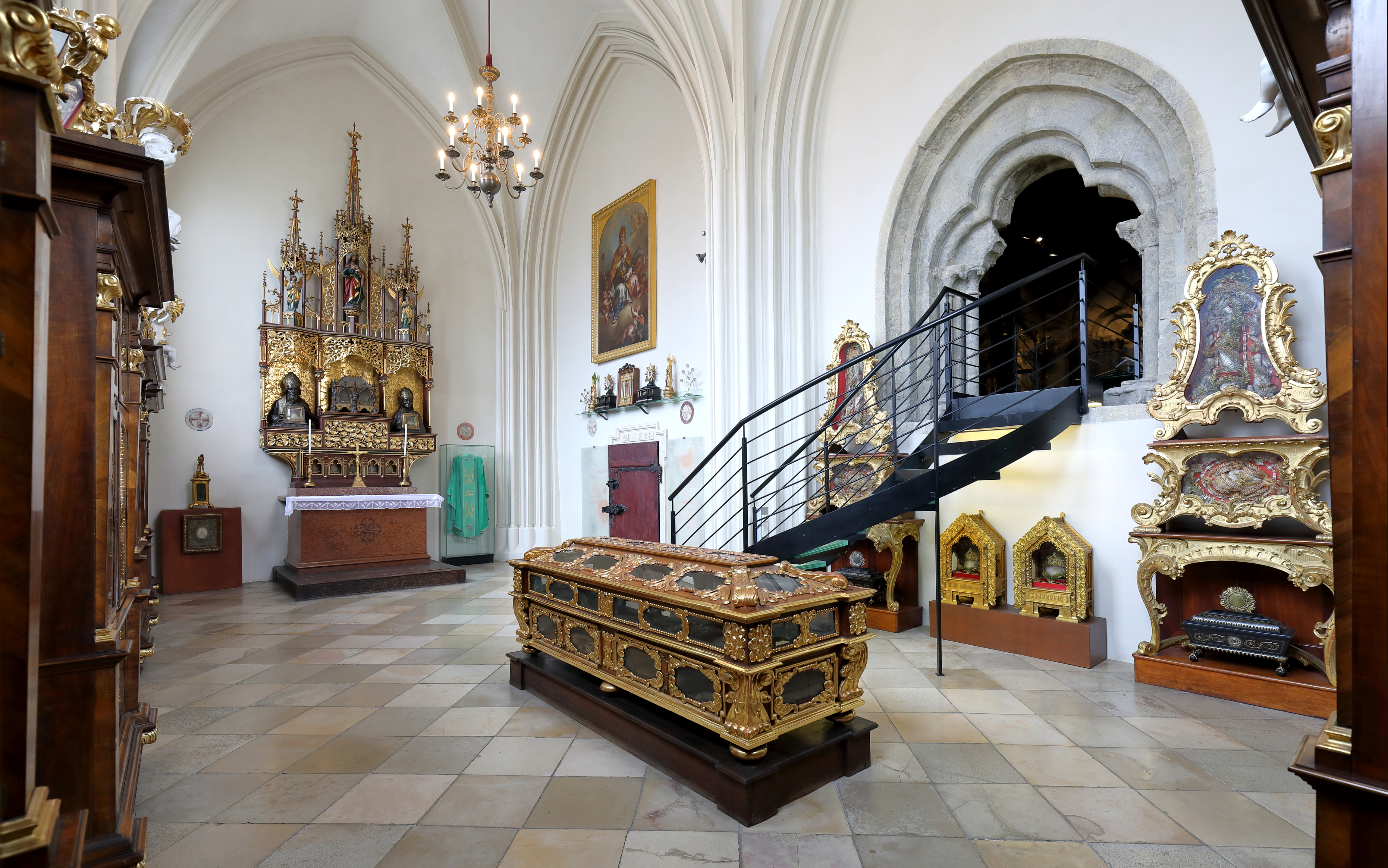 Die Valentinskapelle im Stephansdom in der österreichischen Bundeshauptstadt Wien.Seit Anfang des 20. Jahrhunderts wird sie als Reliquienkammer genutzt und wurde 2012/13 renoviert. Dabei schuf man auch einen Übergang in die benachbarte romanische Turmkammer, in der nun ebenfalls Prunkstücke der Reliquiensammlung im Rahmen der musealen Dauerausstellung „Der Domschatz von St. Stephan“ präsentiert werden.